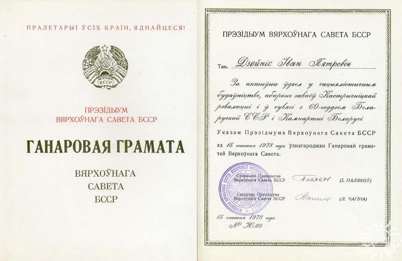 Дэйніс. Ганаровая грамата Вярхоўнага Савета БССР. 1978